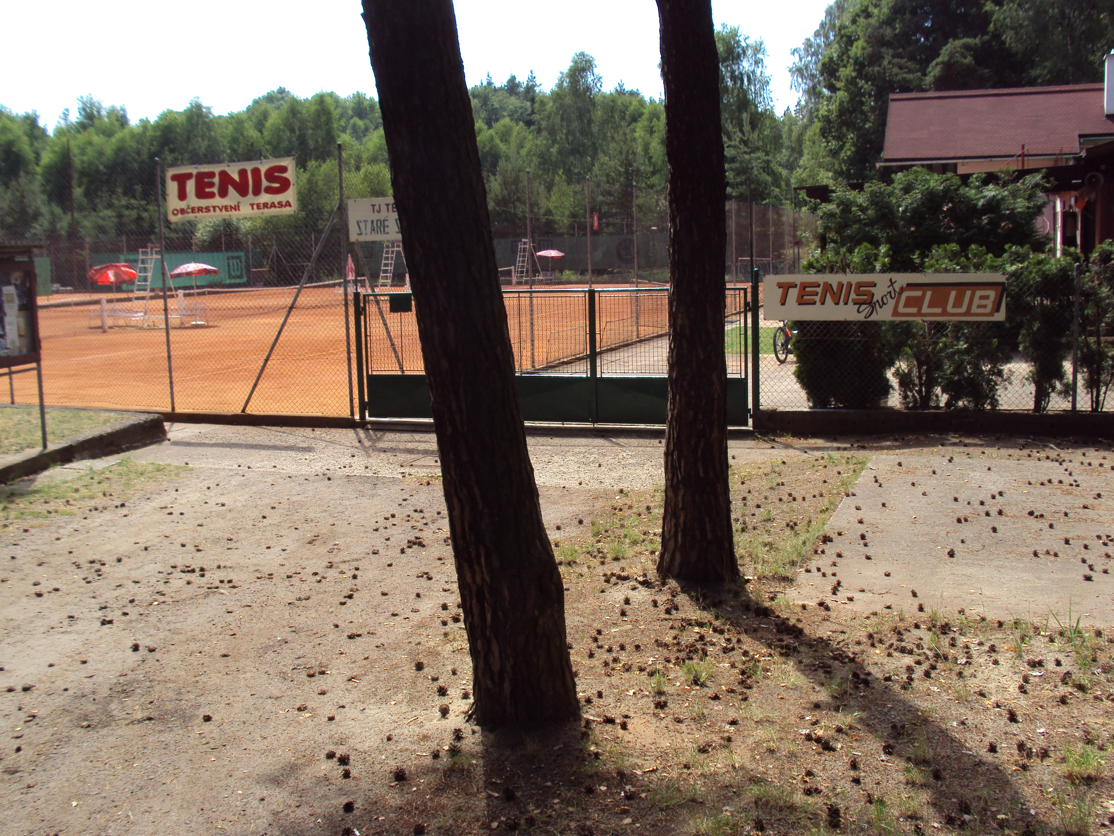 Česky: Areál tenisového klubu ve Starých Splavech